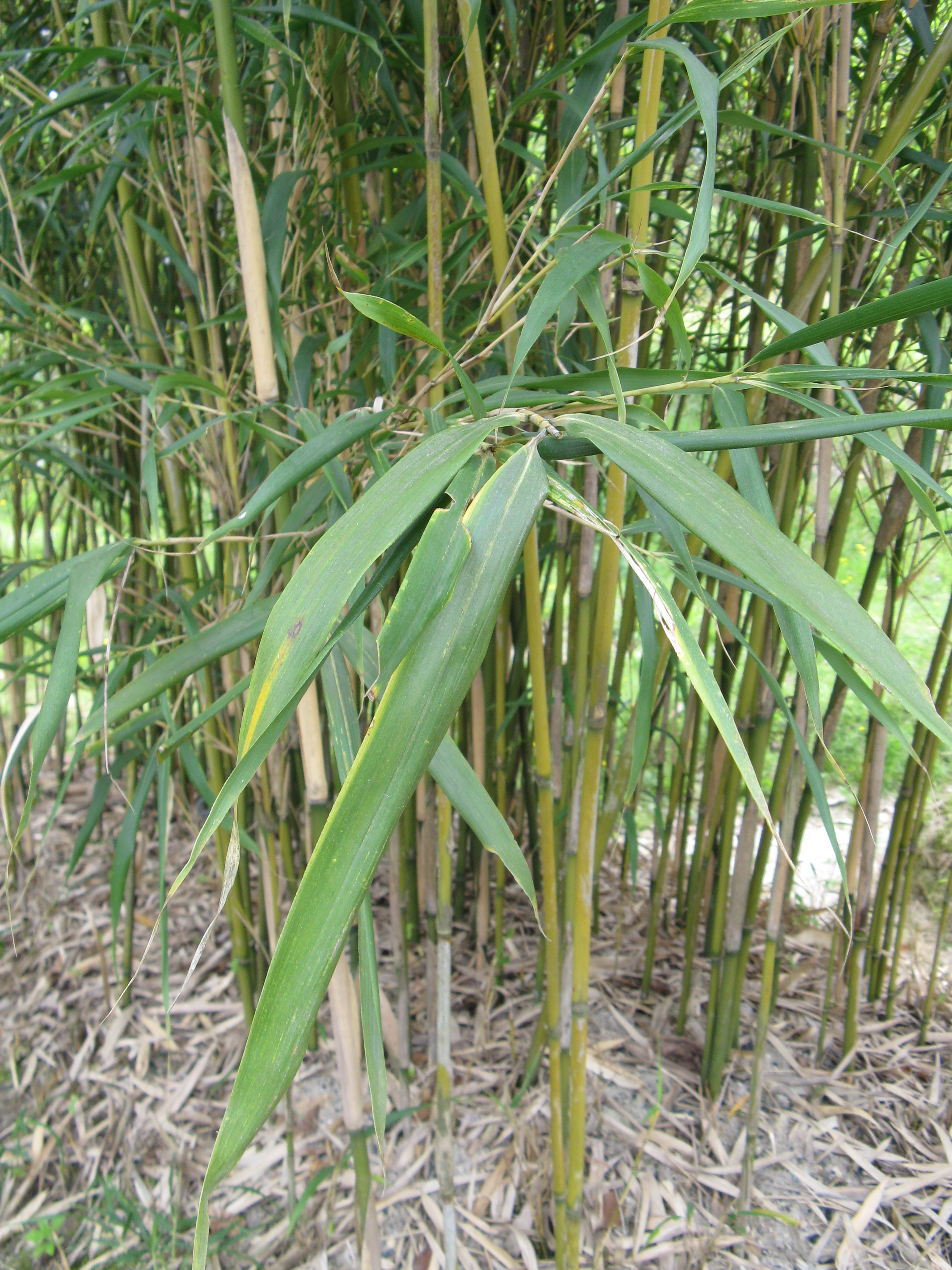 Pleioblastus hindsii